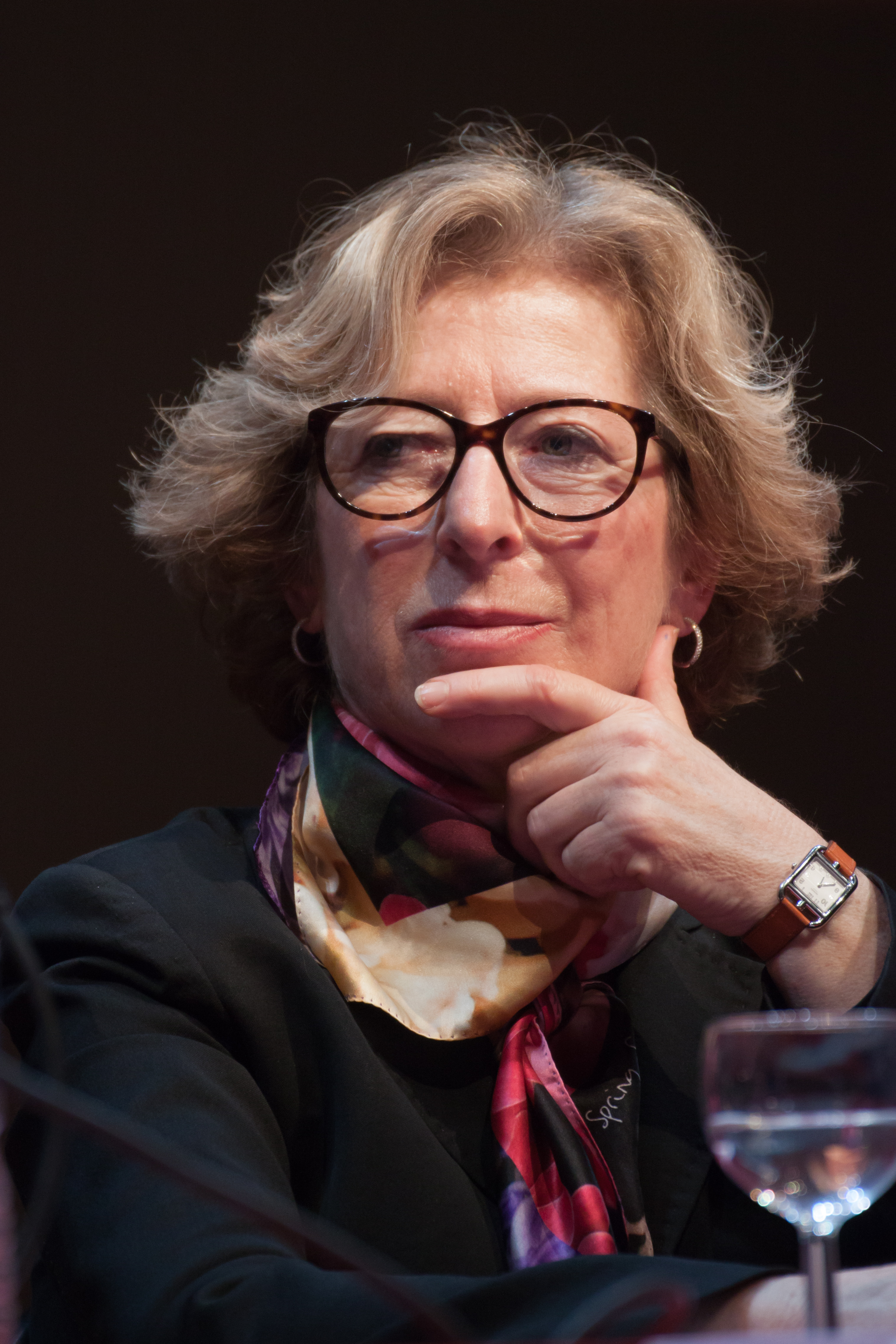 Geneviève Fioraso lors du Forum Libération 2013 de Grenoble.